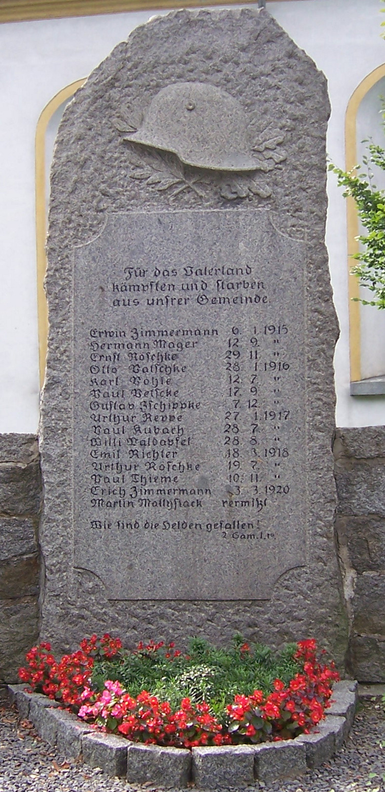 Deutsches Weltkriegsdenkmal für die gefallenen Soldaten des Ersten Weltkriegs aus Großgrabe vor der dortigen Kirche.